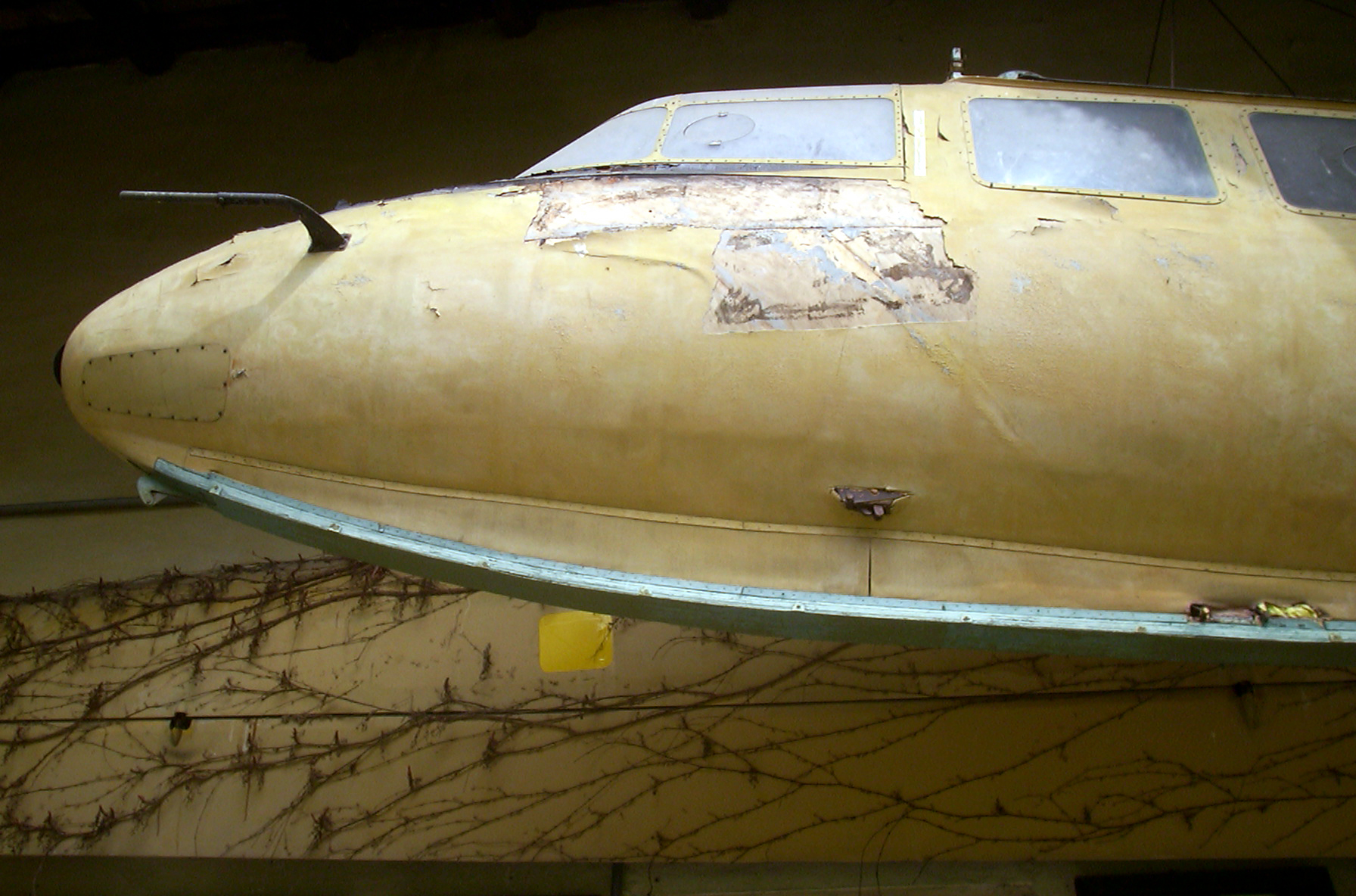 Uno degli alianti esposti sotto la barchessa del Museo dell'Aria e dello Spazio di San Pelagio, Due Carrare, Padova.